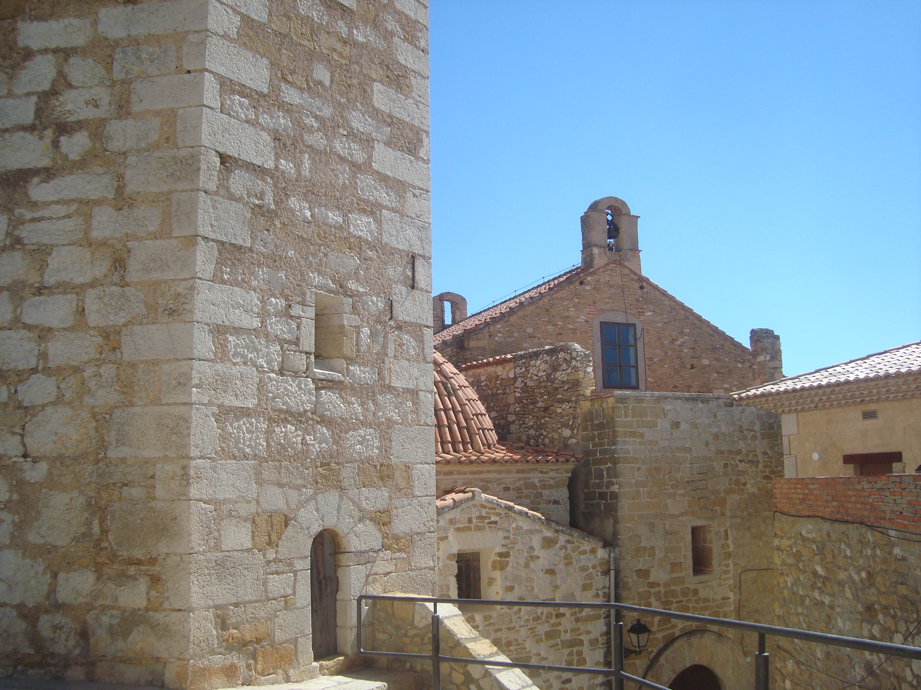 Església parroquial de l'Assumpció i torre campanar (Cervera del Maestrat) 03.044-003.